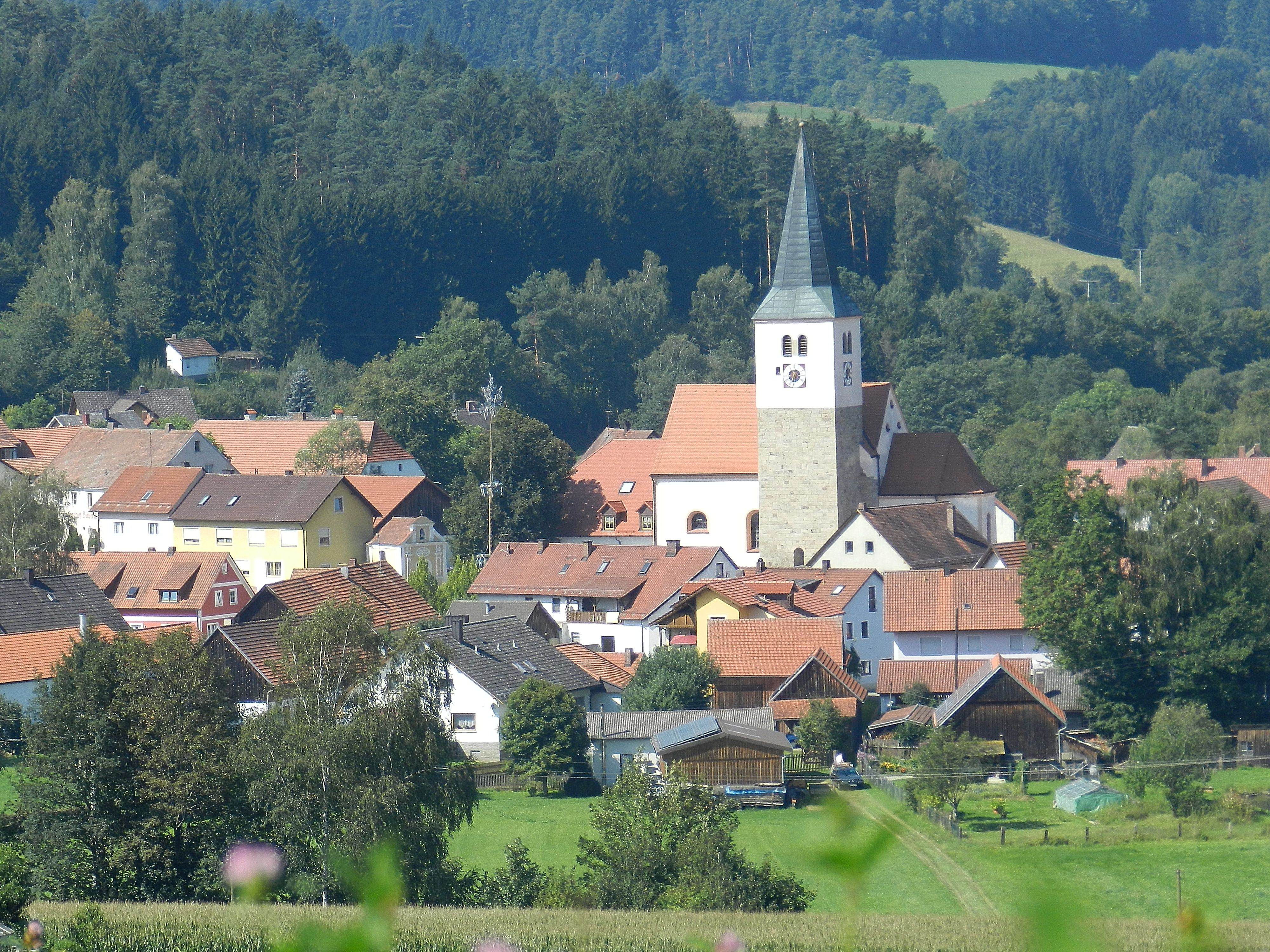 Pertolzhofen, Wallfahrtskirche St. Marien (Gemeinde Niedermurach, Landkreis Schwandorf, Oberpfalz, Bayern) (2011)